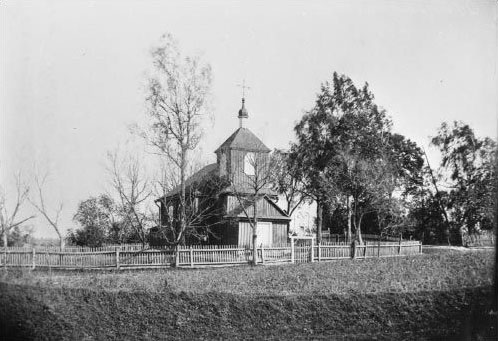 Беларуская (тарашкевіца): Гаруцішкі (Haruciški). Царква